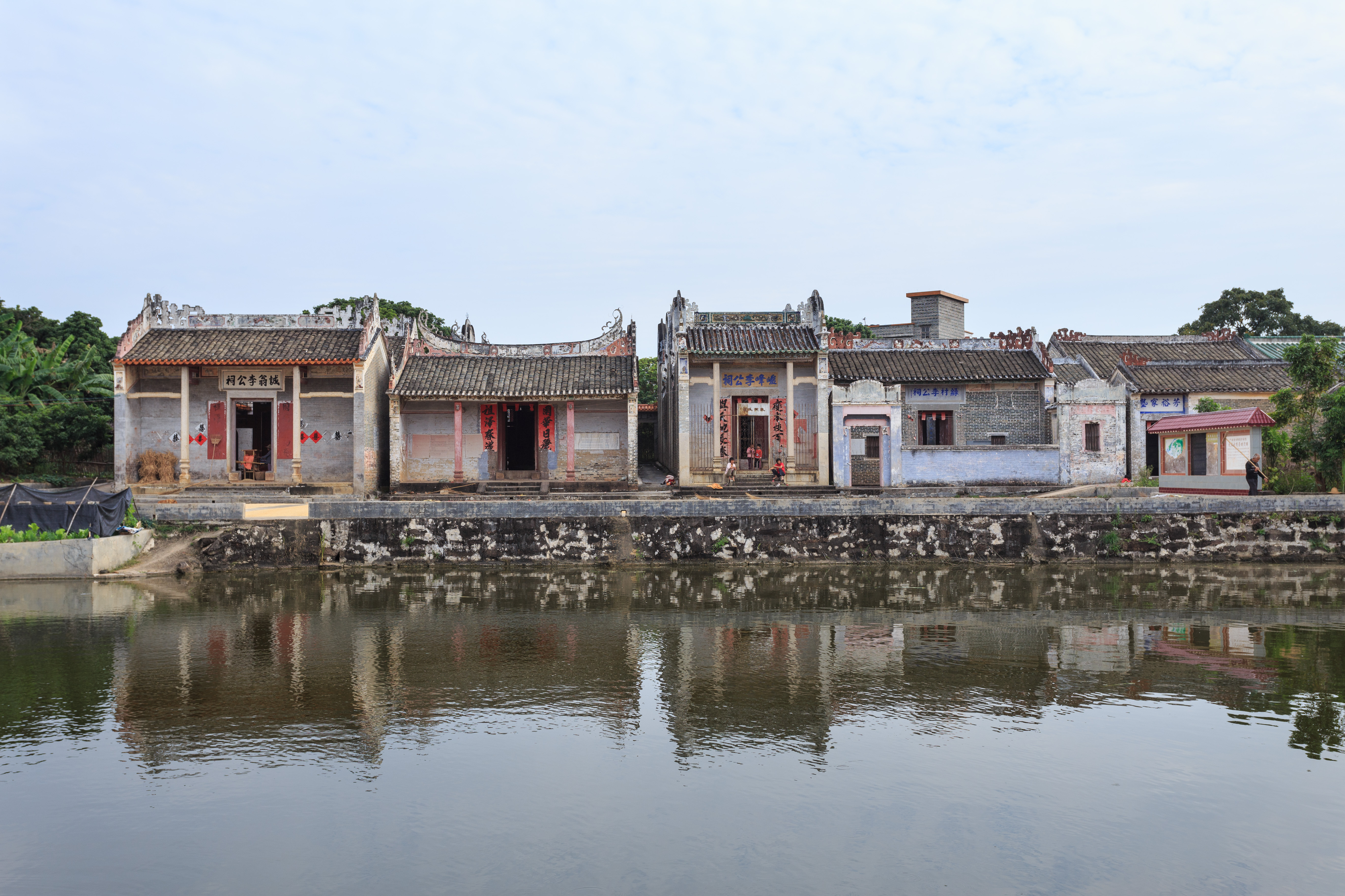 大湾民居 东风村——诚翁李公祠、峻峰李公祠、绿村李公祠、芳裕家塾